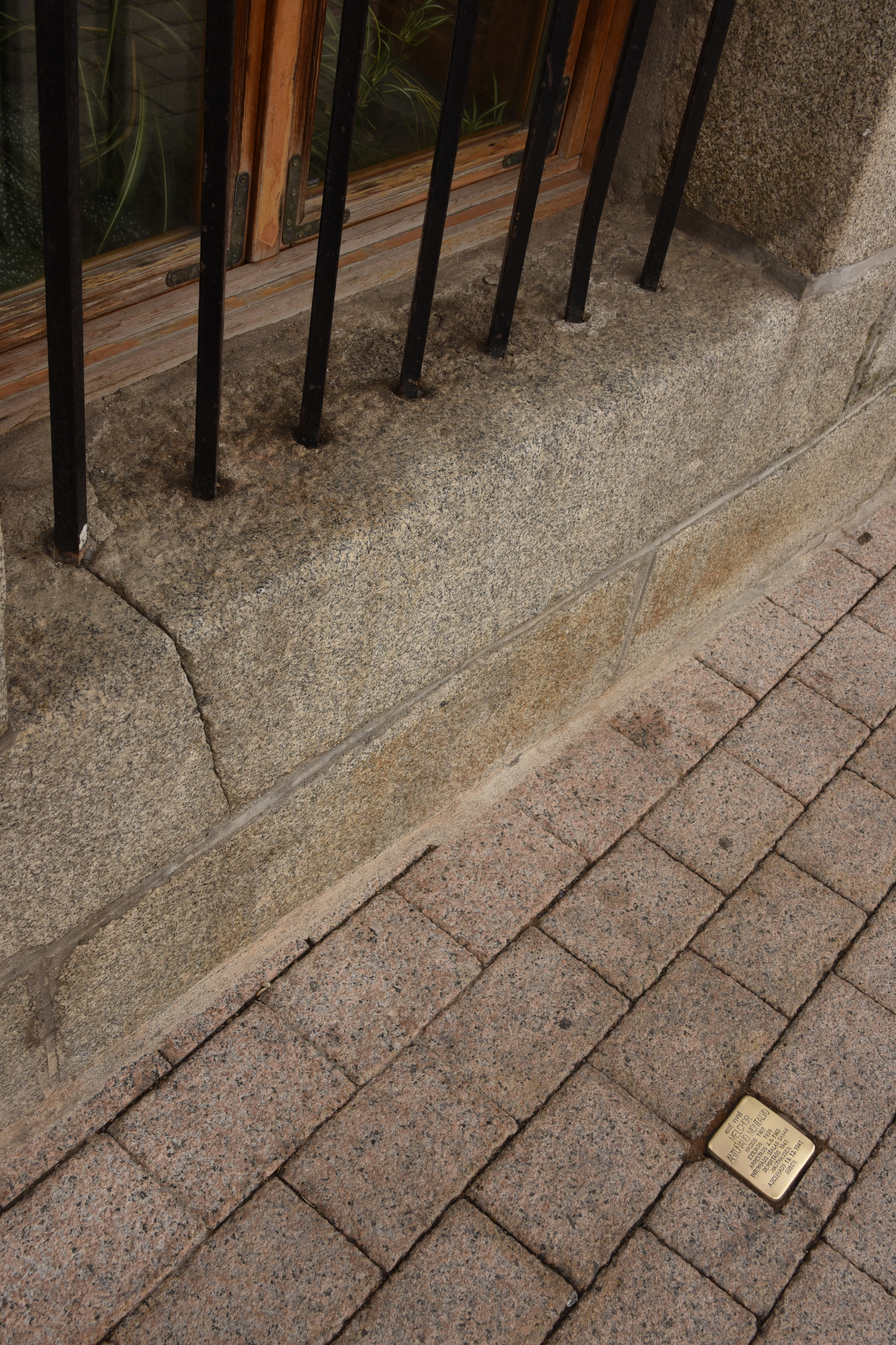 Stolperstein für Melchor Antunano Montalvo